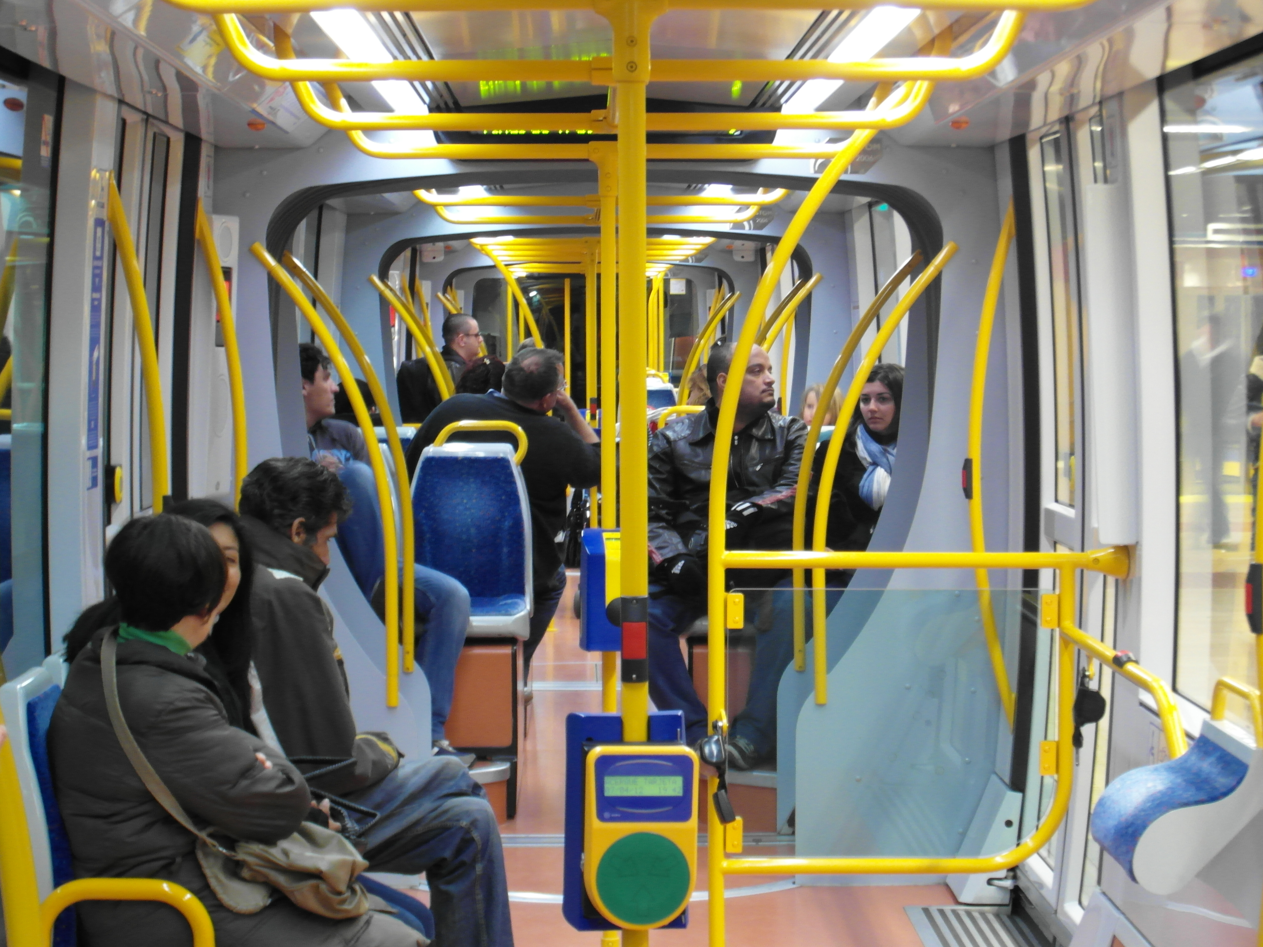 Madrid - Inside Tram - Metro Ligero ML1